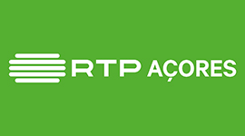 Logótipo da RTP Açores